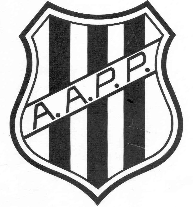 Logo: Associação Atlética Ponte Preta, Ponte Preta (SP), Brazil.